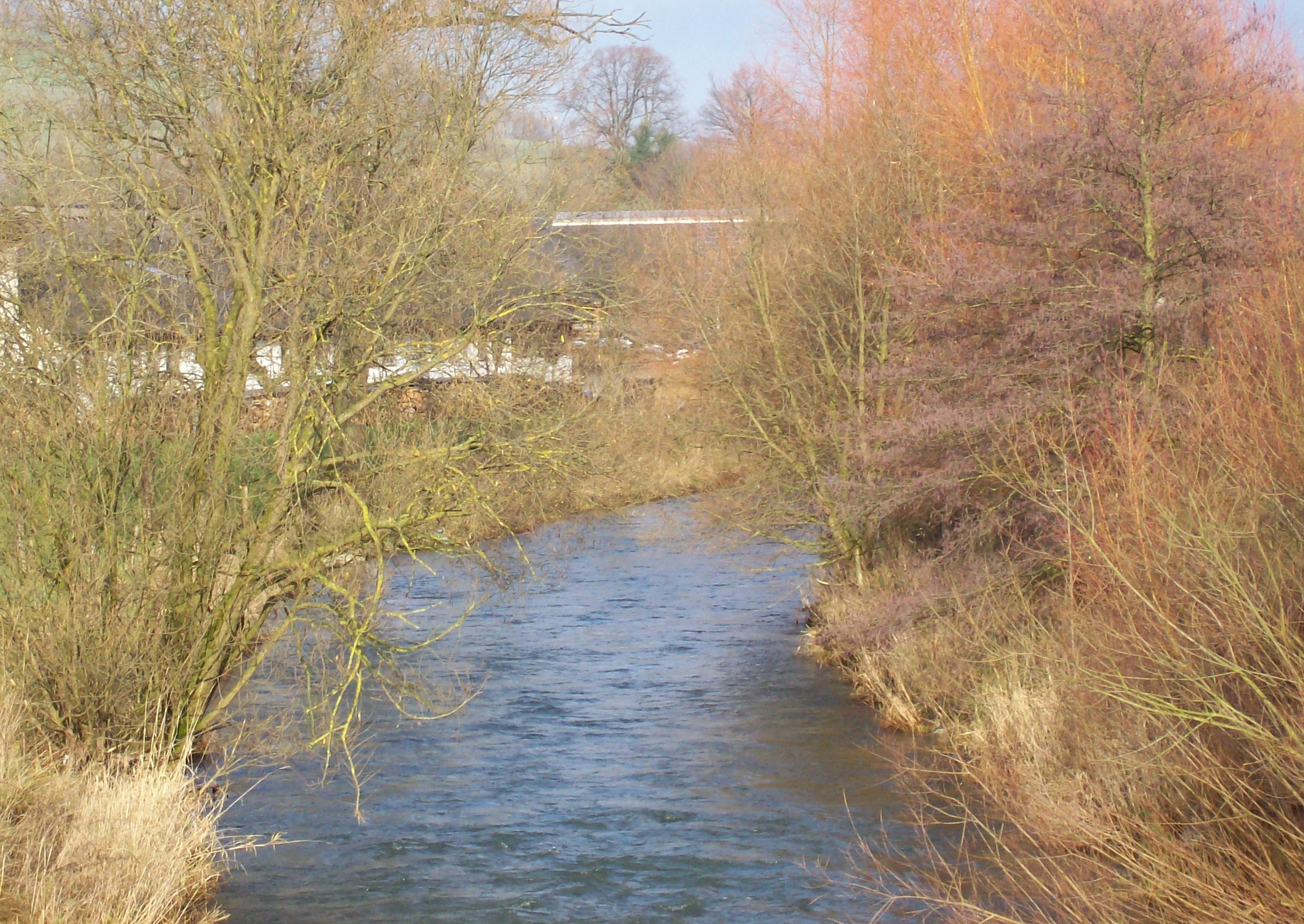 Wenne (Fluss) in Meschede-Berge, 2008